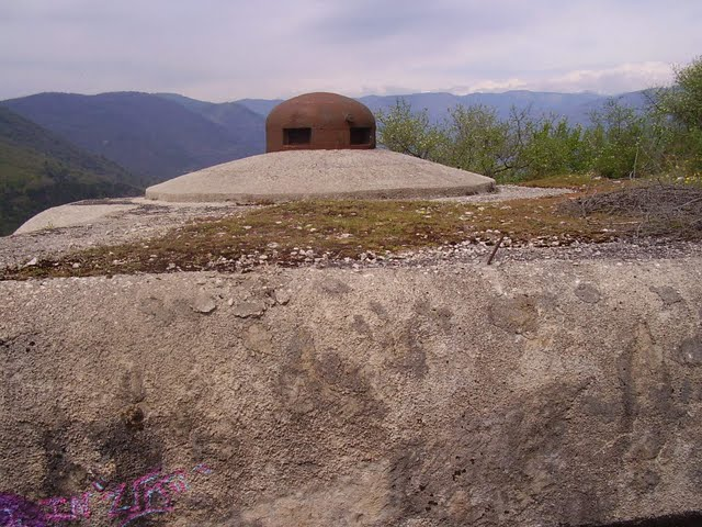 Campana GFM ("Guardia Fucile Mitragliatore") dell'opera Maginot di Sainte-Agnès.